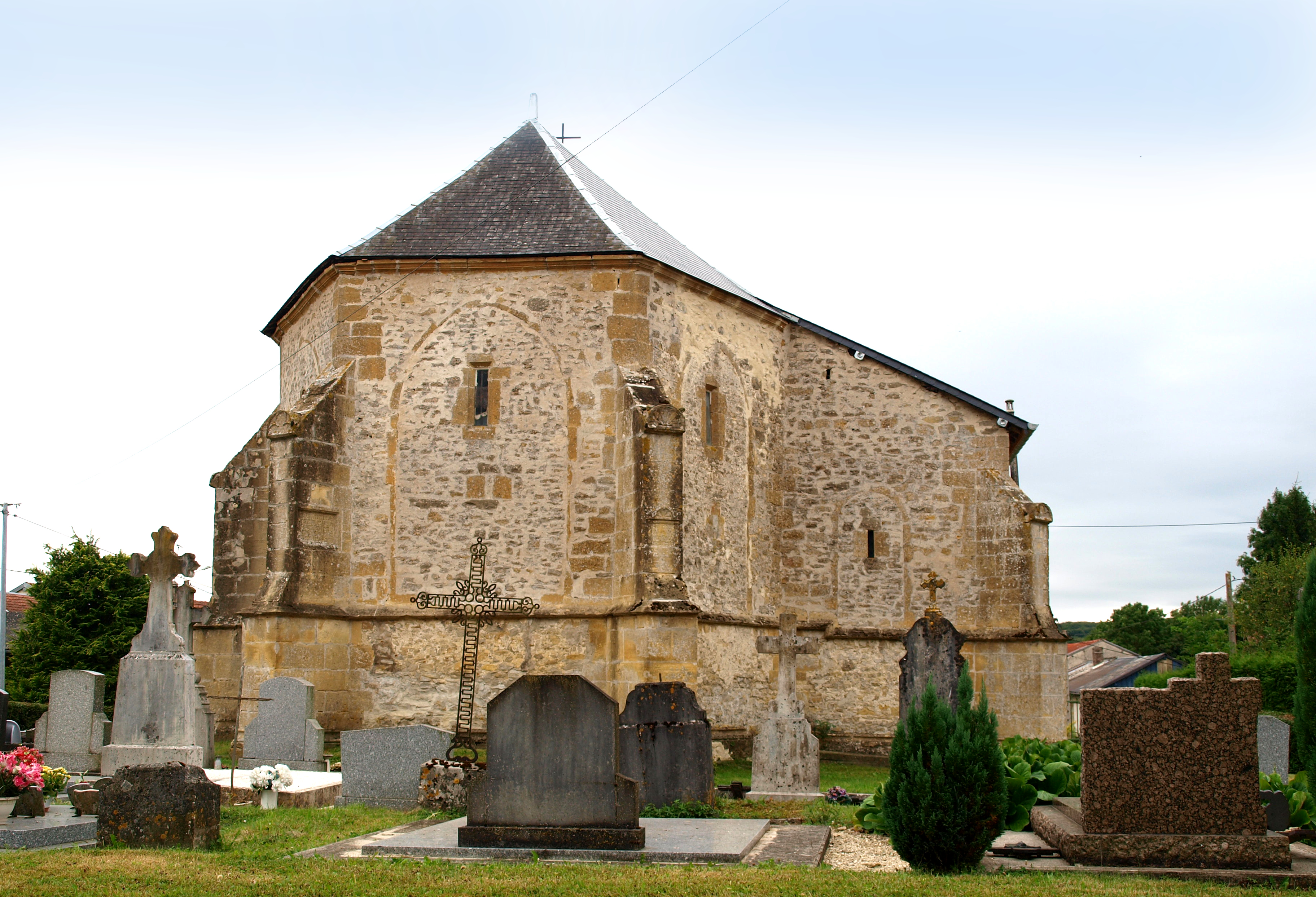 Noirval (Ardennes, France) ; église